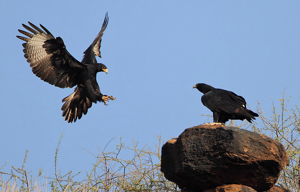 Image taken at Baringo cliffs, Lake Baringo, Kenya.